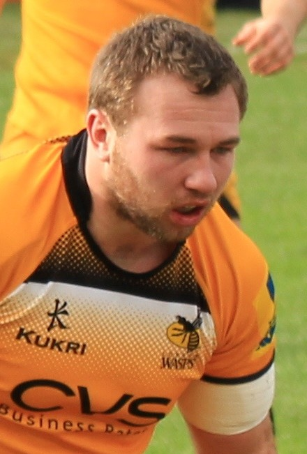 Harlequins vs Wasps